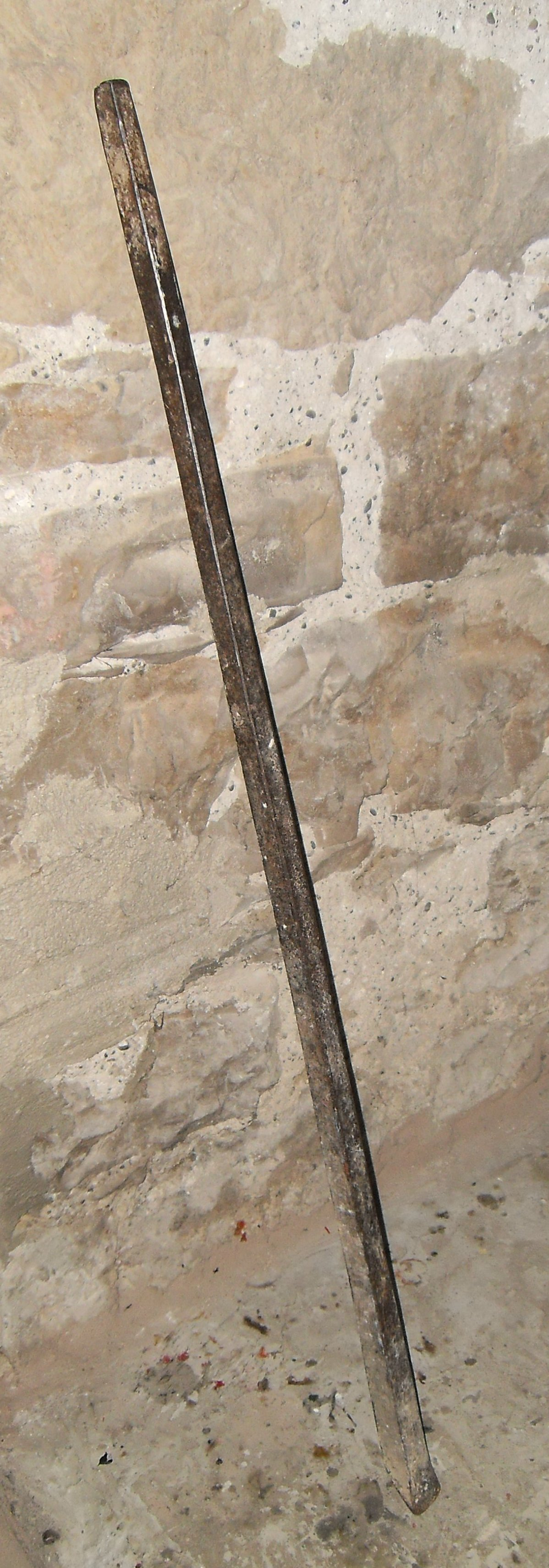 Brecheisen